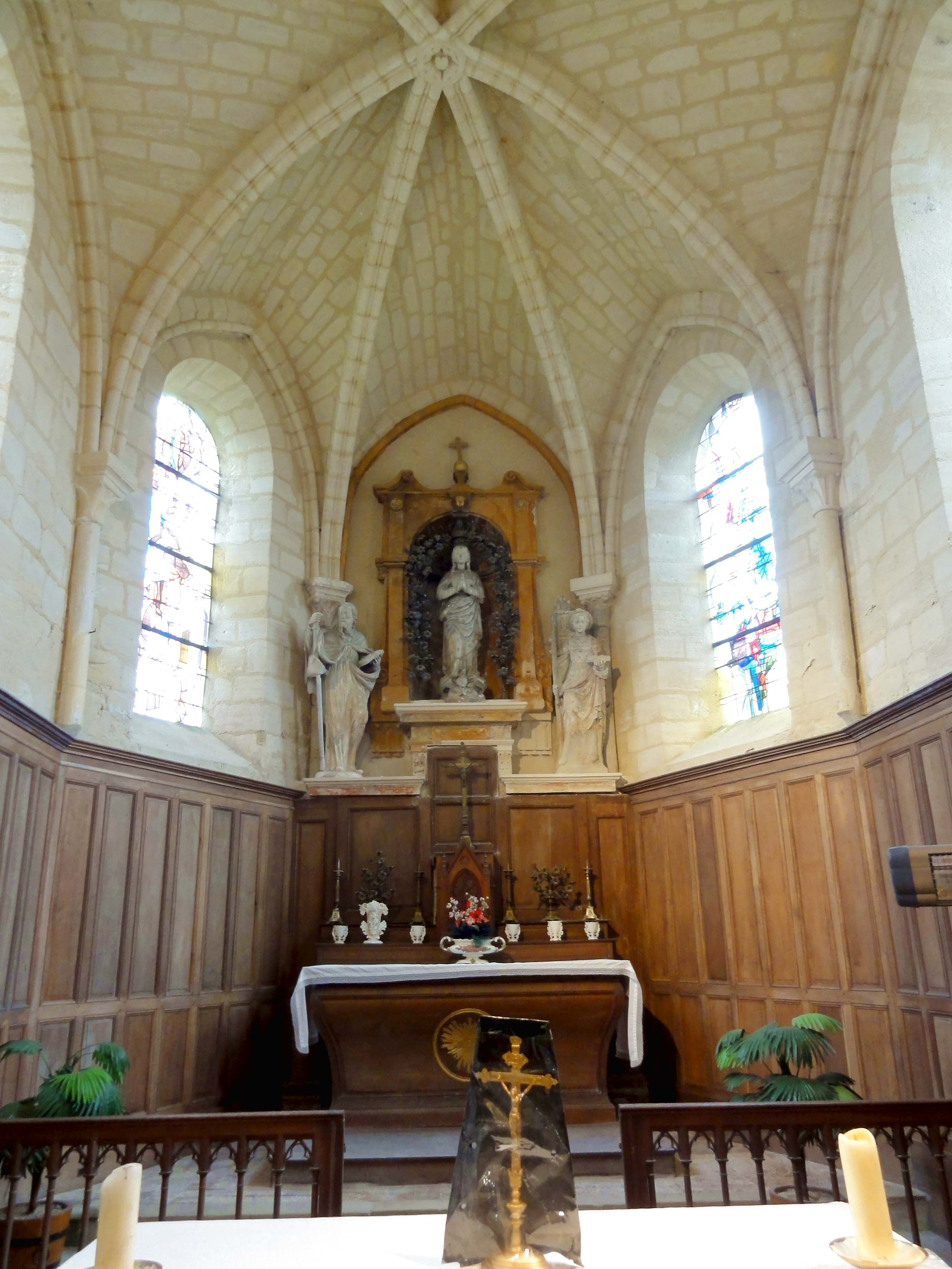 Intérieur de l'église - voir titre.